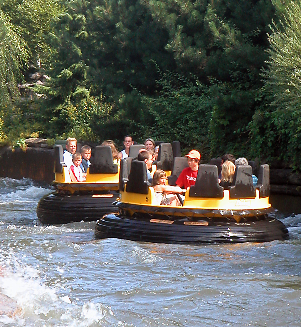 Kållerado - åkattraktion på Liseberg